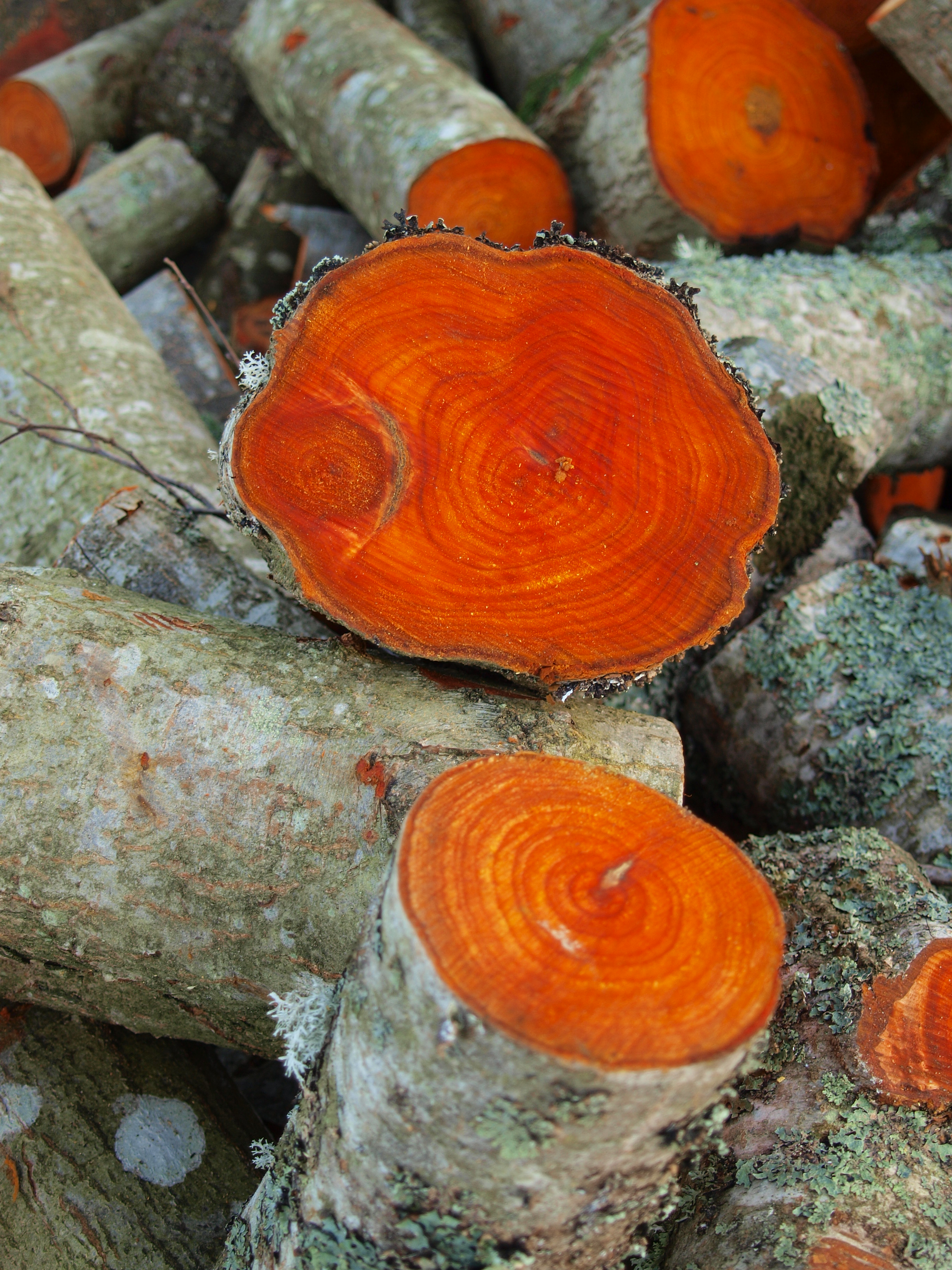 Pildil halli lepa (Alnus incana) puit.